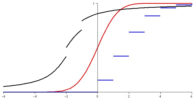 3 fonctions de répartition: en rouge : celle de la loi normale centrée réduite, en bleue : celle de la loi de Poisson(2). en noir : combinaison linéaire de mesures de proba : 1/10 * Dirac(-2) + 1/10 * Dirac(-1) + 4/5 * Cauchy(-2,1) simulées en maple